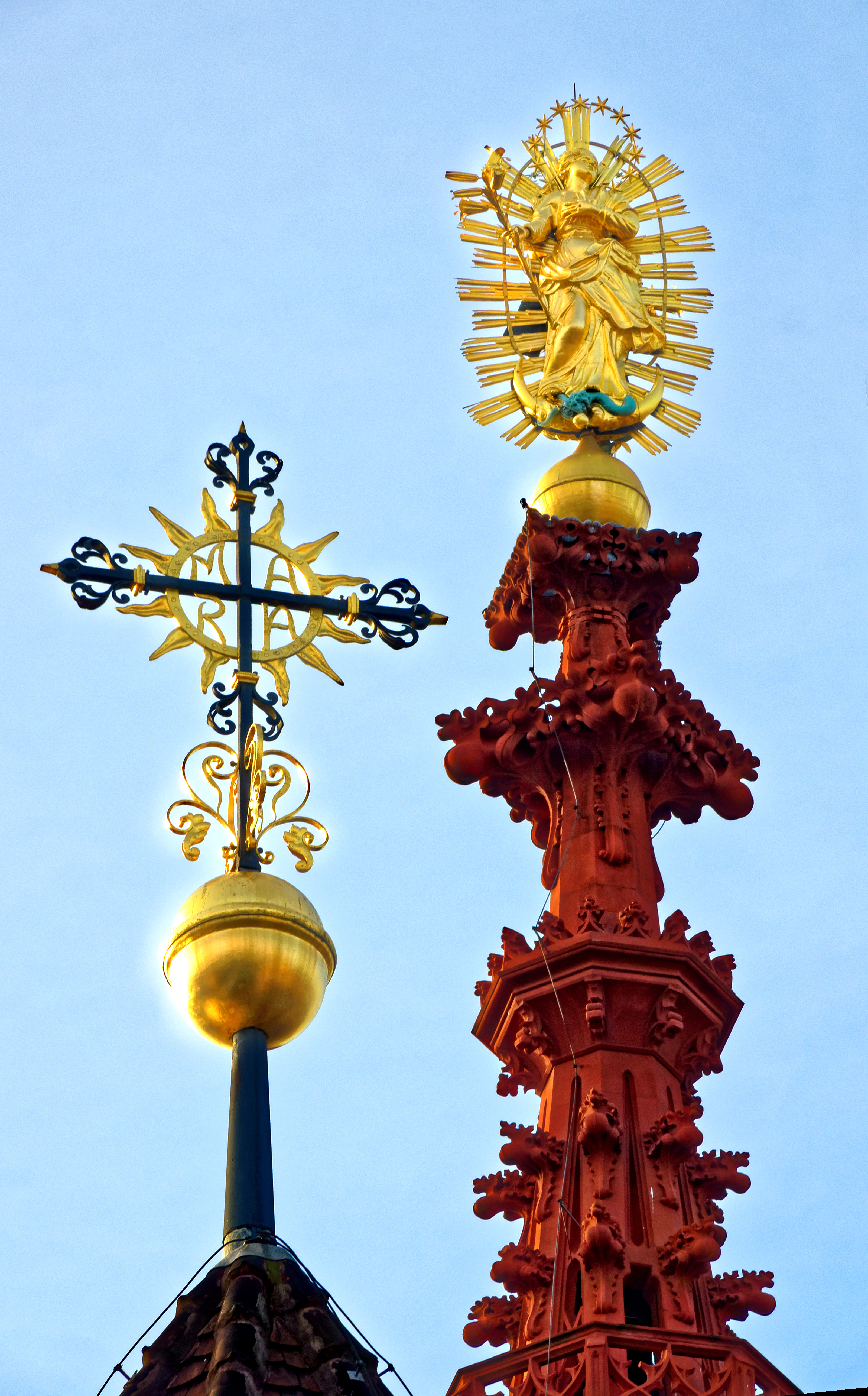 Turmzier der Marienkapelle Würzburg.